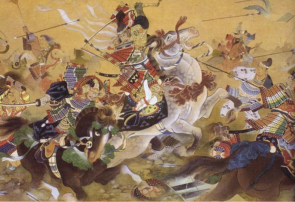 筑後川合戦絵巻